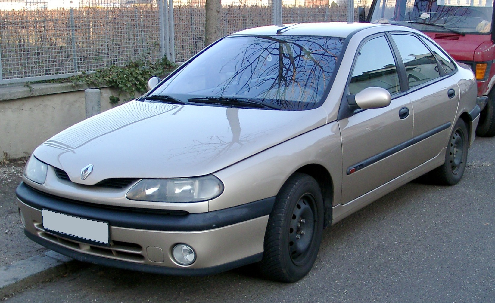 Renault Laguna, 1. Generation